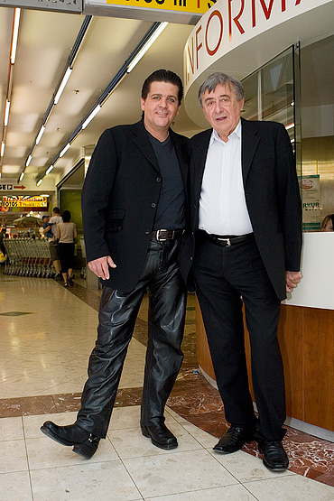 Tony Wegas in der Lugner City